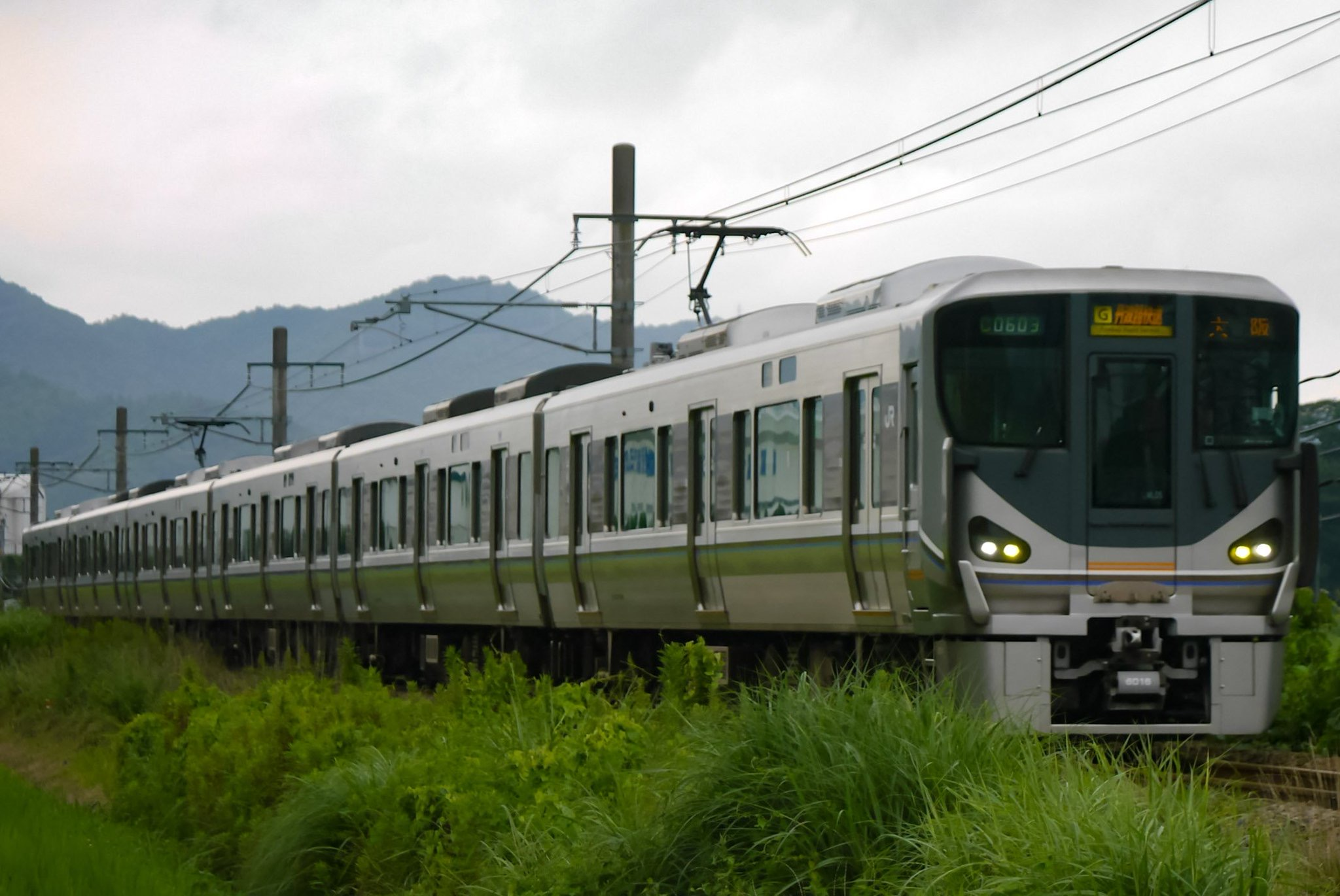 丹波路快速福知山 福知山線丹波竹田-市島